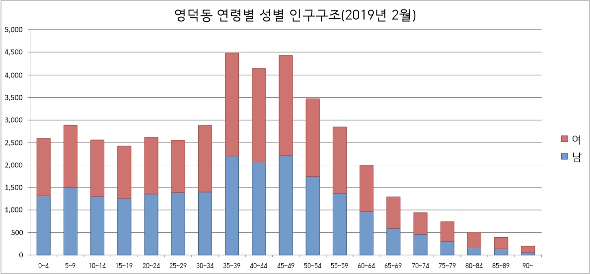 용인시 영덕동 성별 인구구조